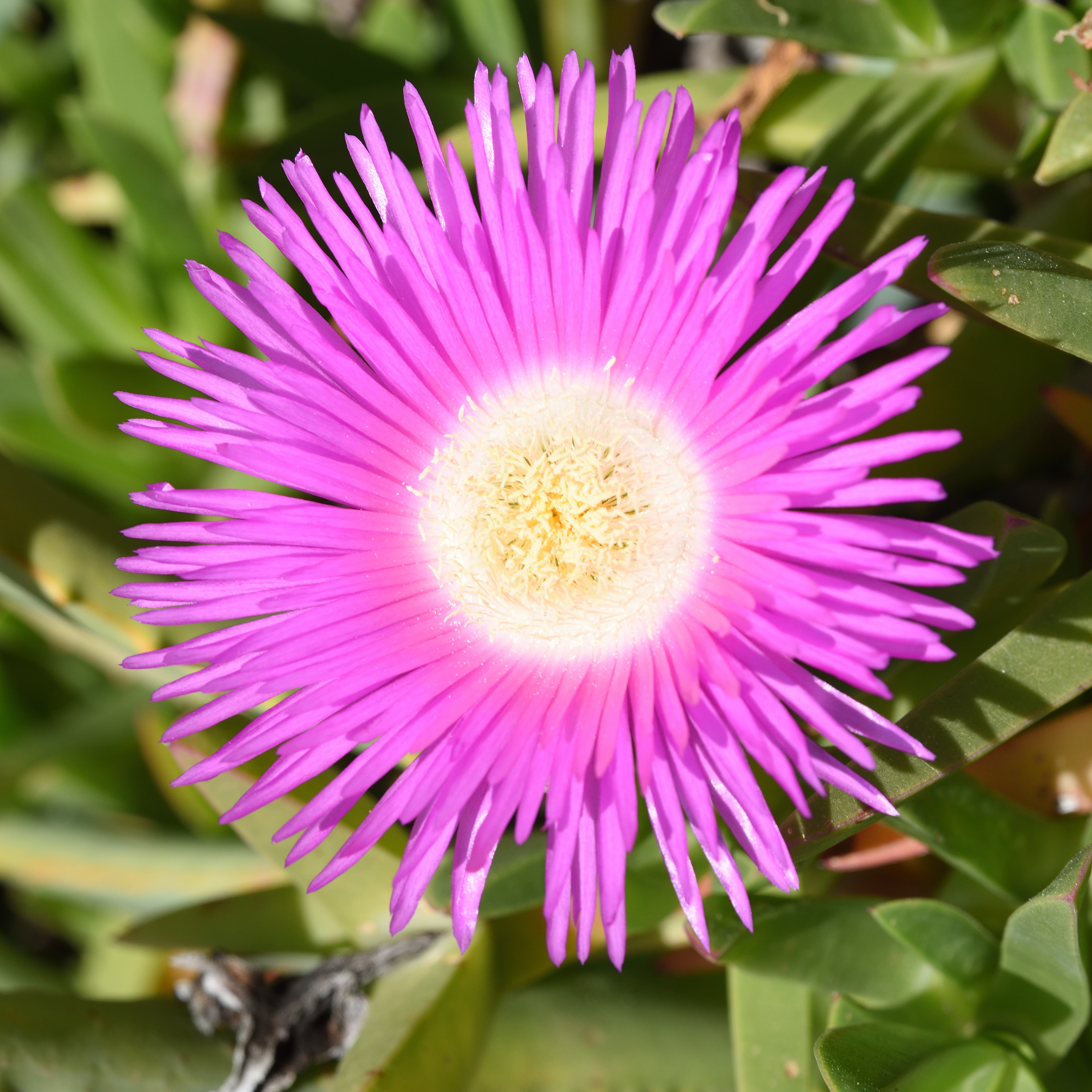 Fiore lilla sopra la spiaggia di Bordighera